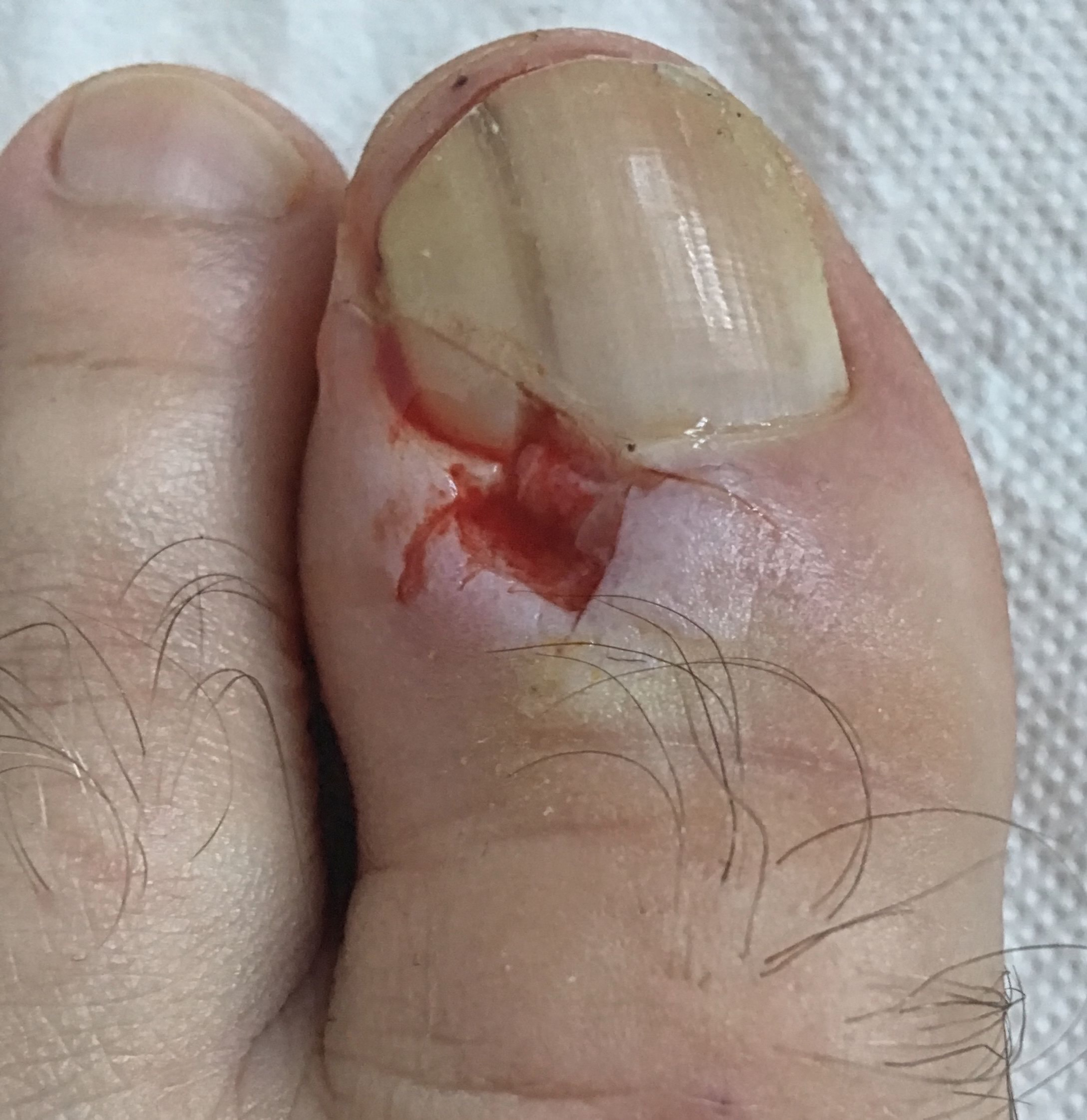 biopsja z wału paznokciowego przy podejrzeniu czerniaka podpaznokciowego